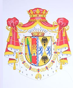 Escudo de armas del Condado de Casa Valencia